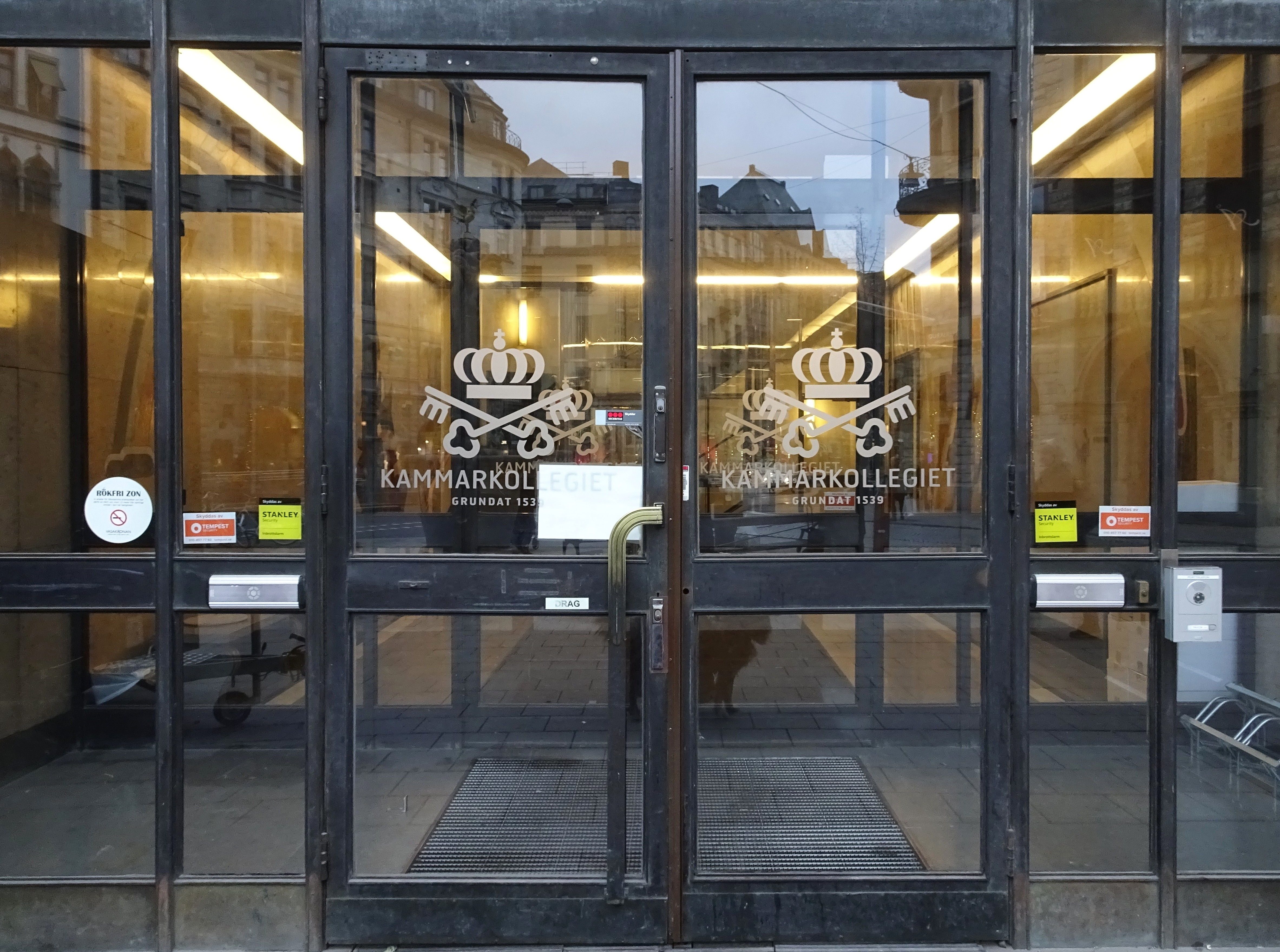 Birger Jarlsgatan 16A, Grev Turegatan 1, Nybyggnadsår 1935, Gustaf Clason (Arkitekt). Städernas Allmänna Brandstodsbolag (Byggherre). Zetterberg AB (Byggmästare)